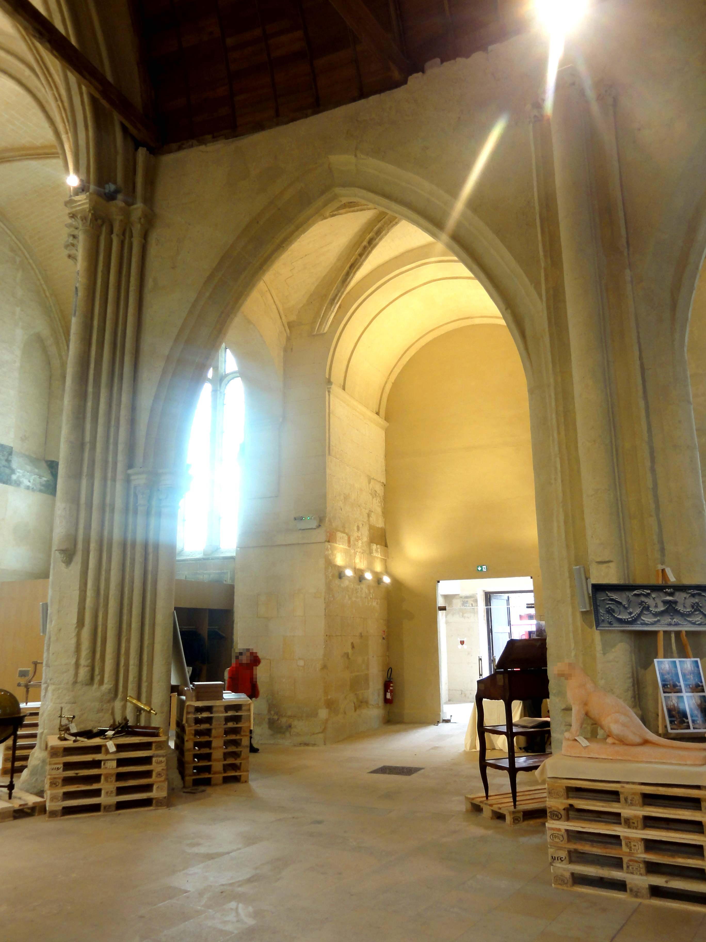 Intérieur de l'église - voir titre.